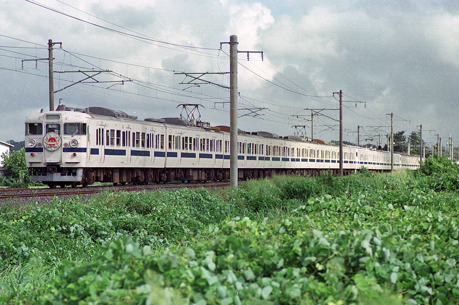 国鉄 415系電車 エキスポライナー